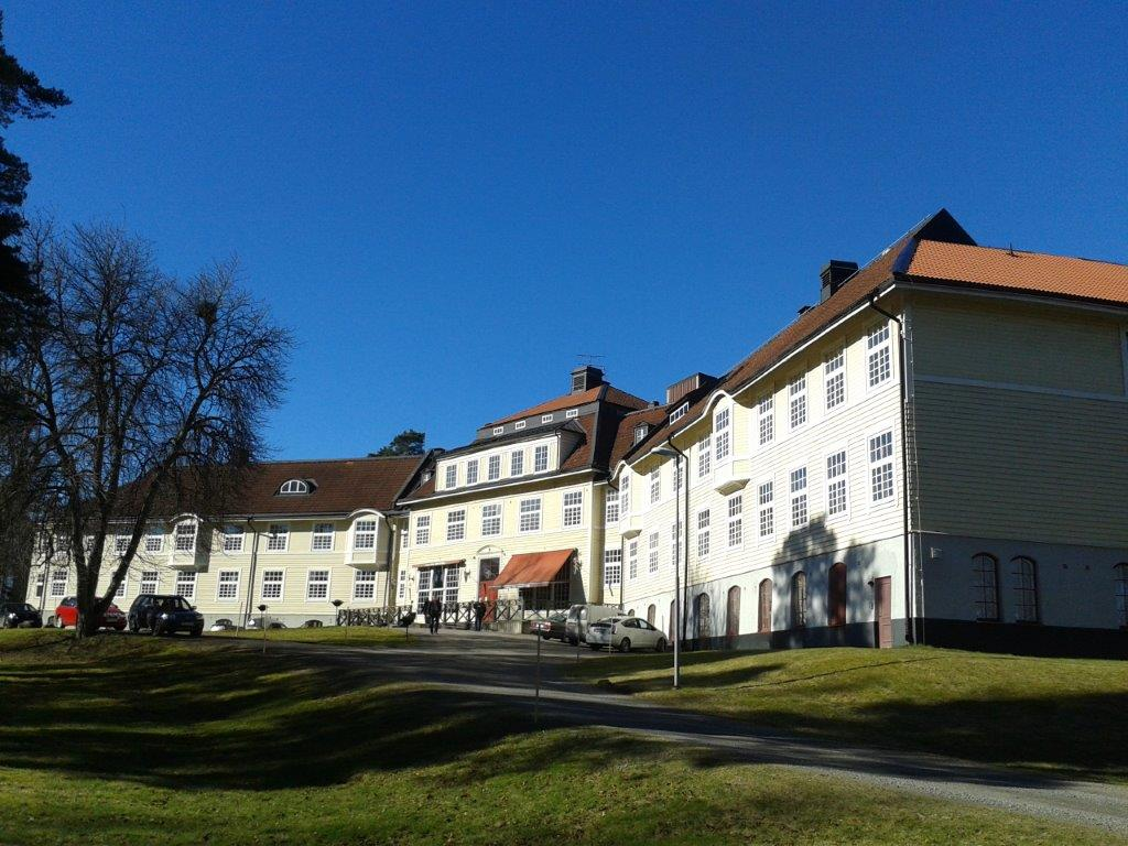 Ljunga Park Hotell, schönes Hotel mit Charme, vakert hotell, nice hotel